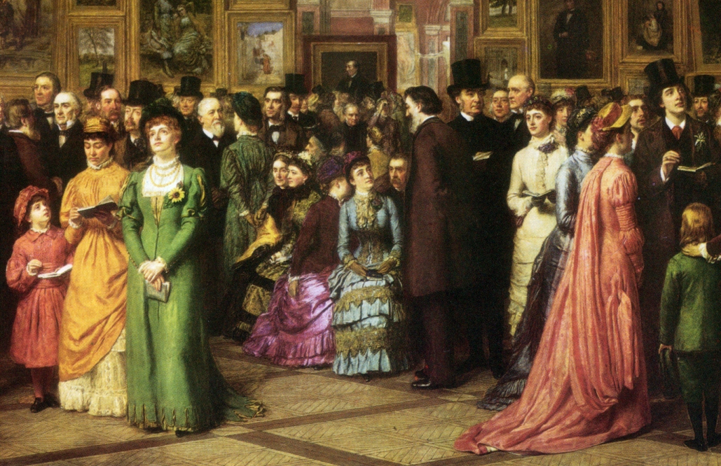 detail